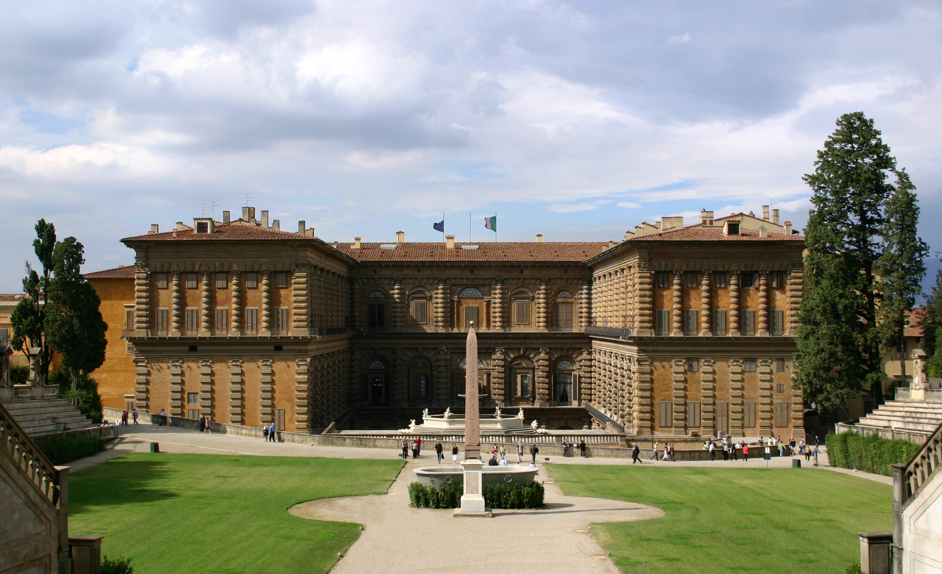 Die Gartenfassade des Palazzo Pitti in Florenz (Brunelleschi zugeschrieben)